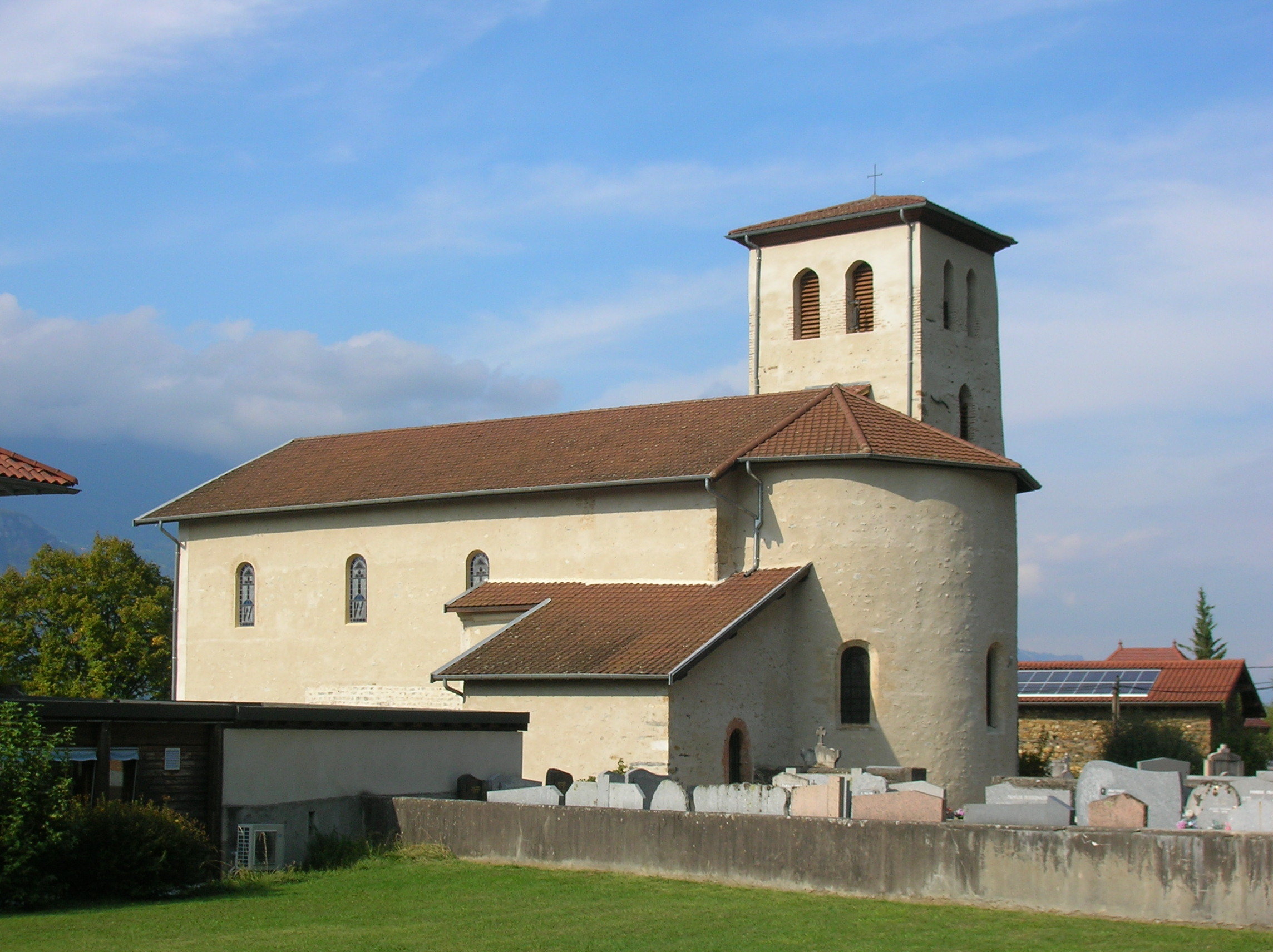 église Notre-Dame, Le Champ-près-Froges, Isère, AuRA, France.